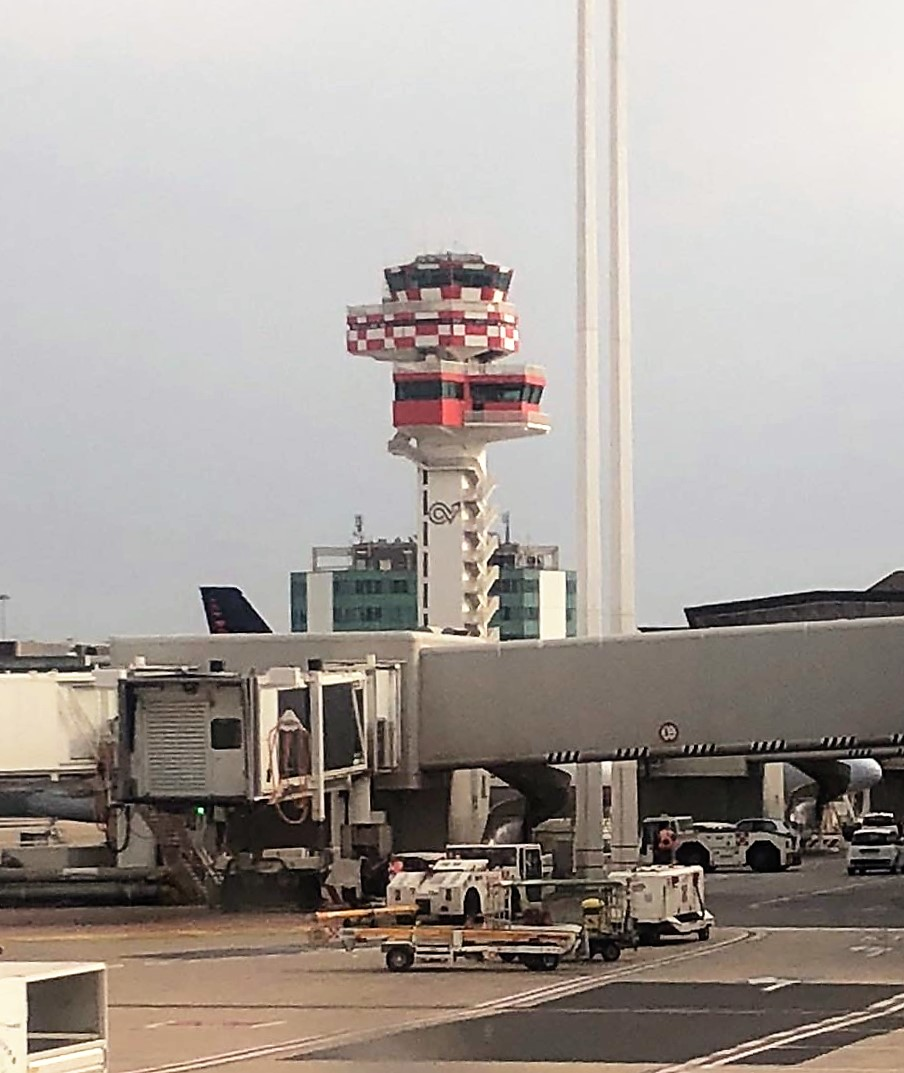 Foto realiazada personalmente desde el aeropuerto.